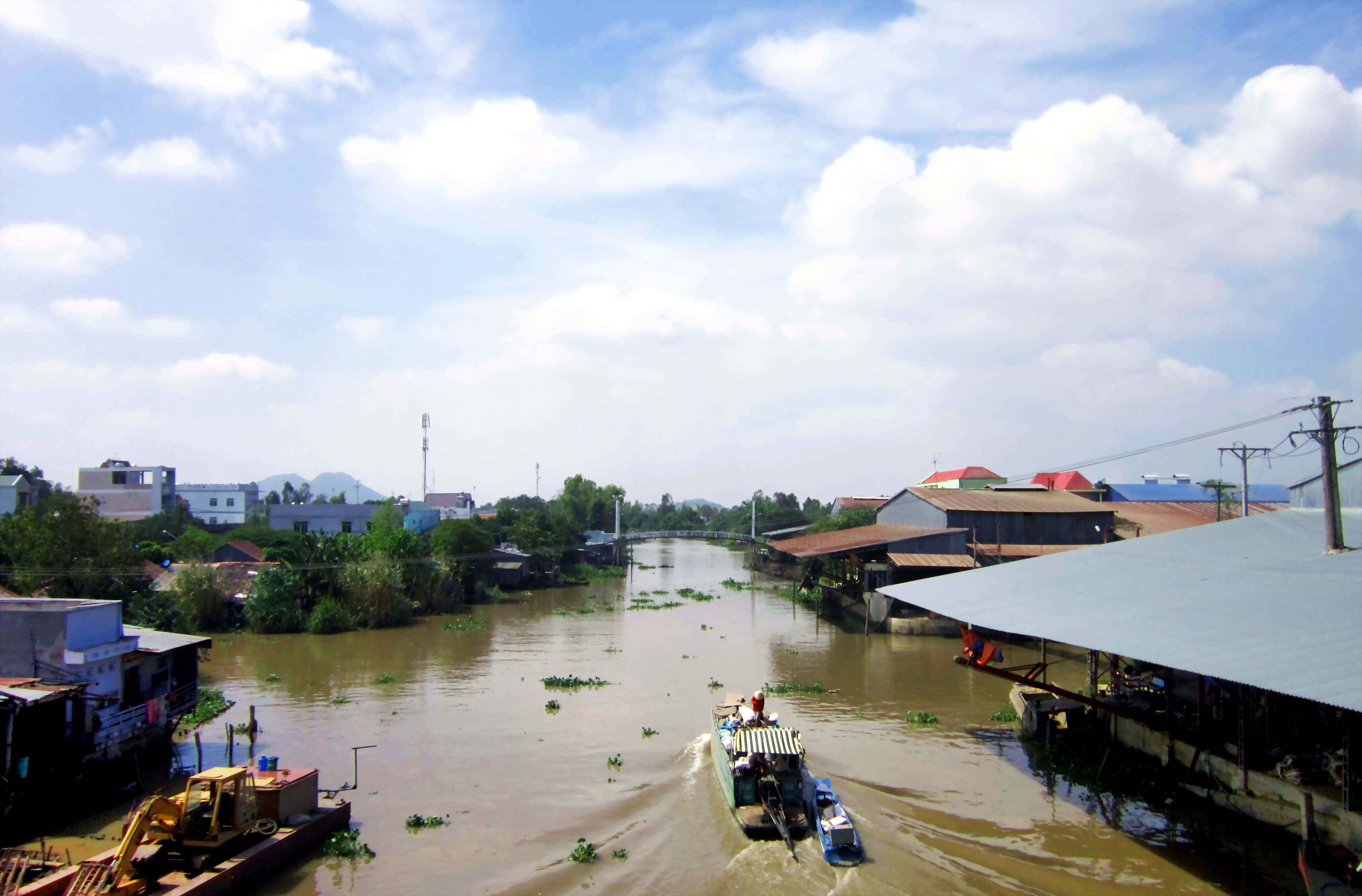 Kênh Thoại Hà, đoạn chảy qua xã Vọng Đông, thuộc huyện Thoại Sơn, An Giang, Việt Nam.